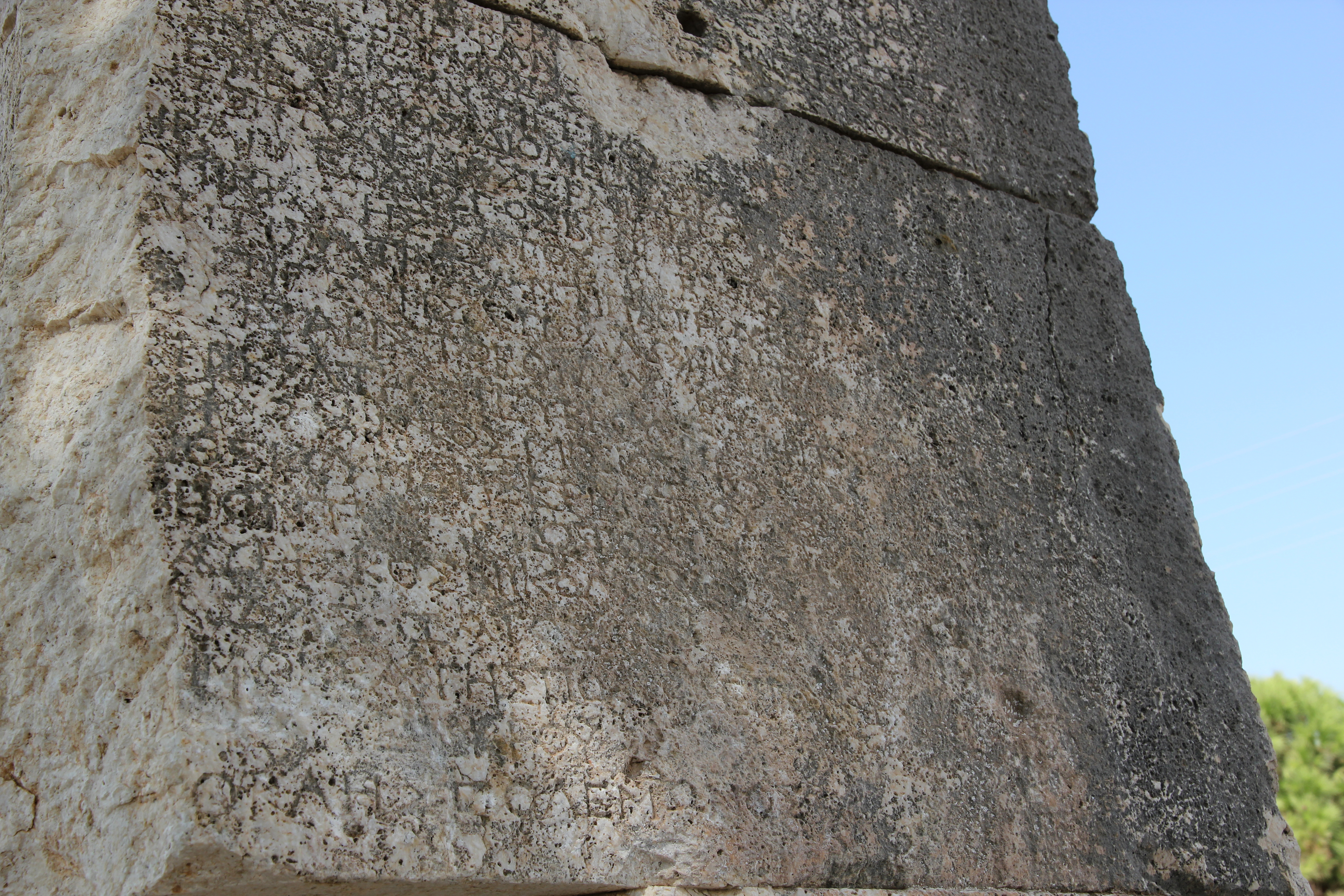 Priesterlisten am Tempel, Cennet ve Cehennem bei Silifke, Südtürkei